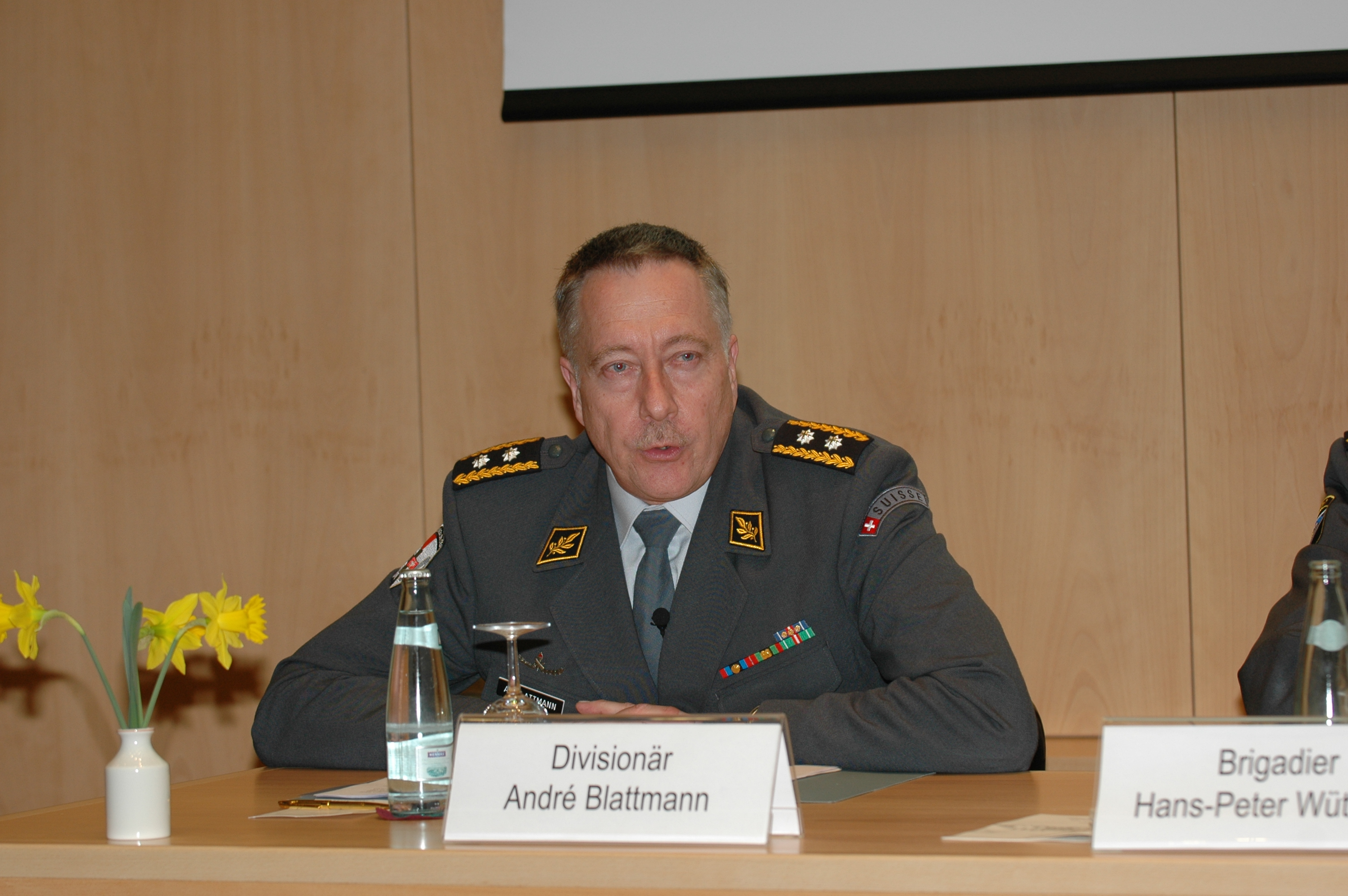 André Blattmann im Lilienberg Unternehmerforum